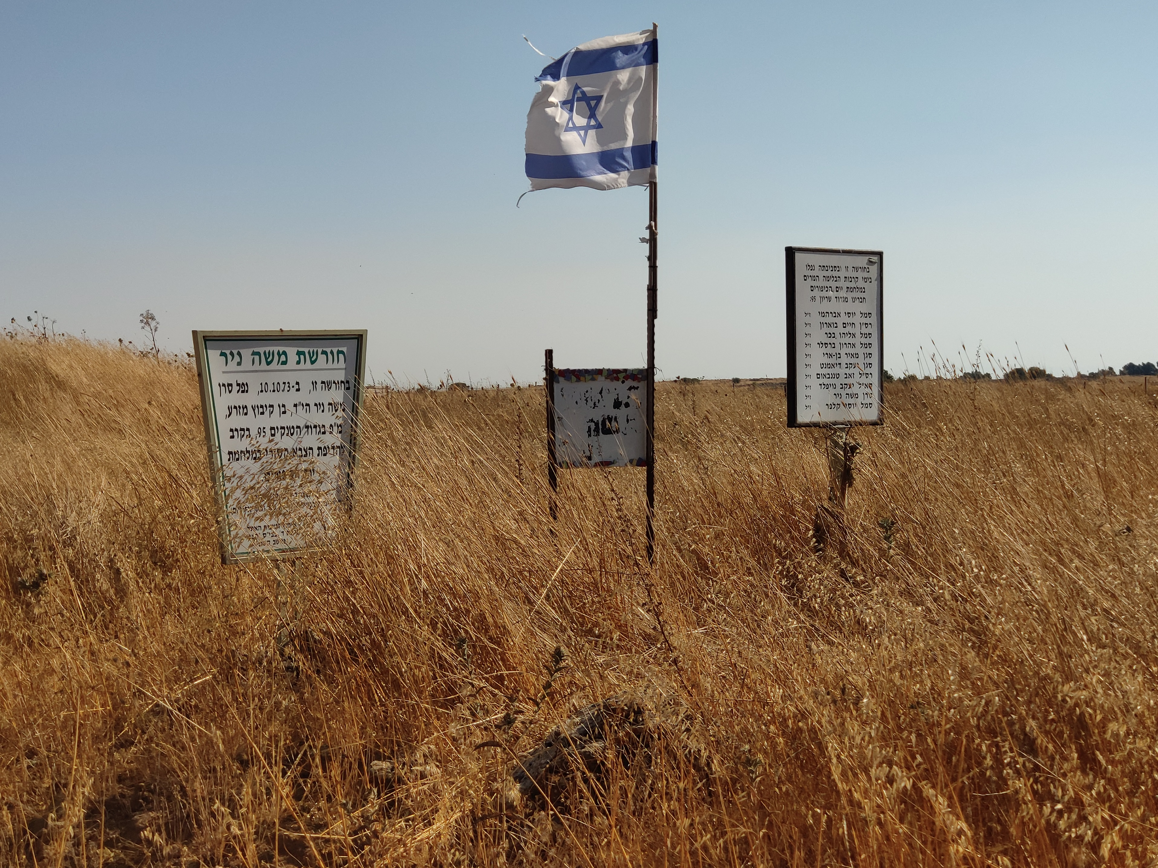 אנדרטה לחללי גדוד 95 במלחמת יום הכיפורים. האנדרטנה נמצאת סמוך לחושניה, על כביש 98.